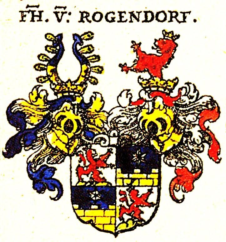 Wappen des reichsfreiherrlichen Geschlechts von Roggendorf (Rogendorf)